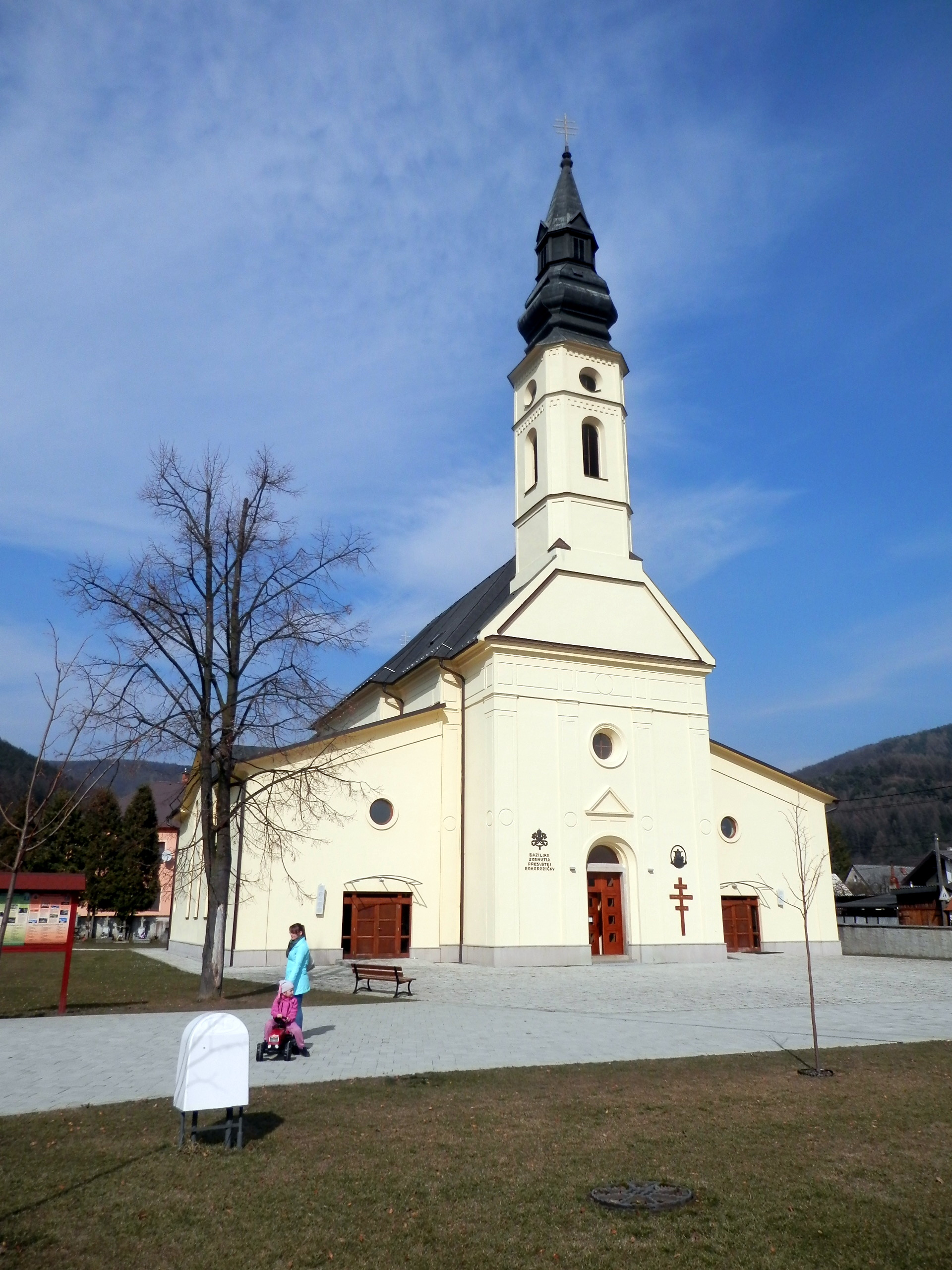 Gréckokatolícka Bazilika minor Zosnutia presvätej Bohorodičky. Budovanie chrámu sa začalo v roku 1896. Stavbu realizoval staviteľ Ján Surín, chrám dokončený a posvätený v roku 1908. V roku 1988 pápež Ján Pavol II. povýšil tento chrám a priľahlé objekty na hodnosť Bazilika minor. Obec Ľutina okres Sabinov.